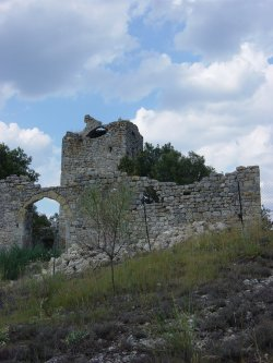 La Tour Bécamel à Salindres (Gard)